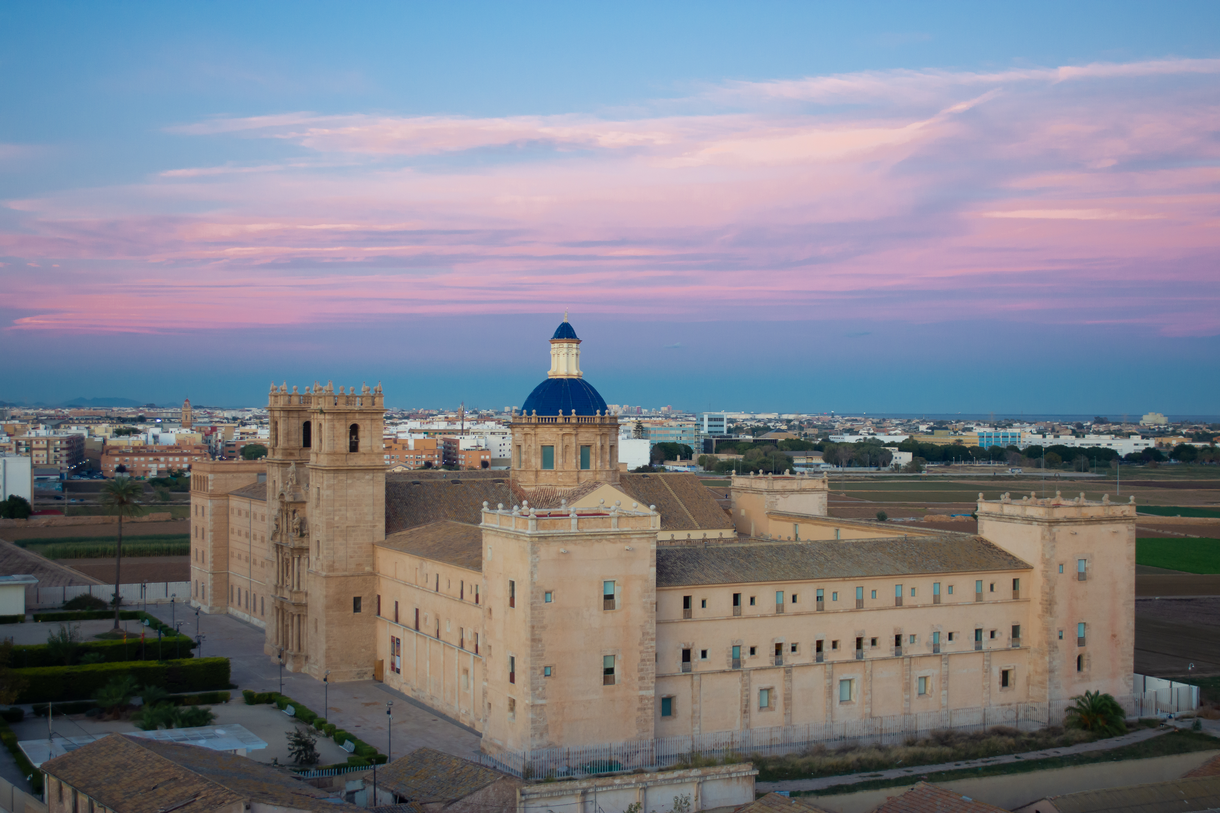 Monasterio de San Miguel de los Reyes al atardecer. Fachadas recayentes a la avenida de la Constitución y a la avenida Hermanos Machado. Sito en la ciudad de Valencia fue fundado en el siglo XVI por el duque de Calabria sobre un antiguo monasterio de la Orden del Císter. Es una importantísima obra del renacimiento valenciano que según algunos autores puede ser considerado como precedente del monasterio de El Escorial, siendo como éste, monasterio jerónimo, foco cultural e iglesia conmemorativa de la memoria de su fundador.